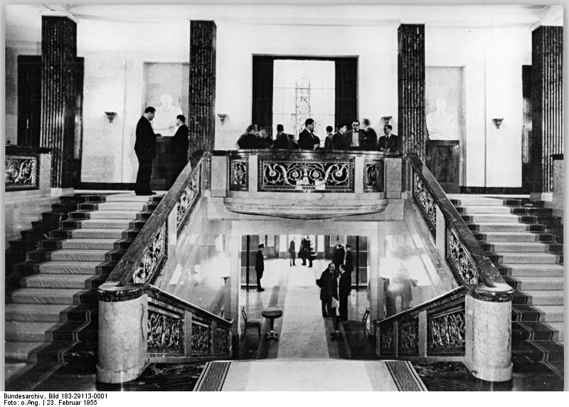 Berlin, Sowjetische Botschaft, Treppenhaus Zentralbild UP-Hlg.Ri.-23.2.1955 Sowjetische Botschaft in Berlin. Das Treppenhaus in der sowjetischen Botschaft Berlin, Unter den Linden.